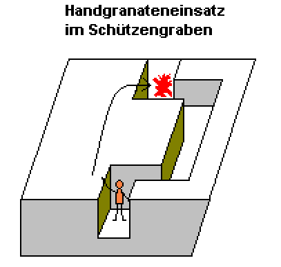 Handgranateneinsatz im Schützengraben